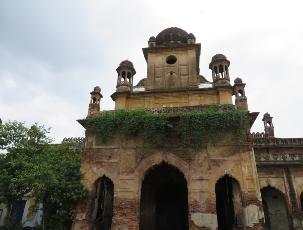 Rifa-e-Aam Club